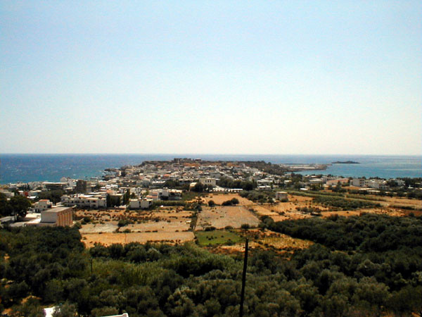 Paleochora von der Nordseite aus im Überblick.